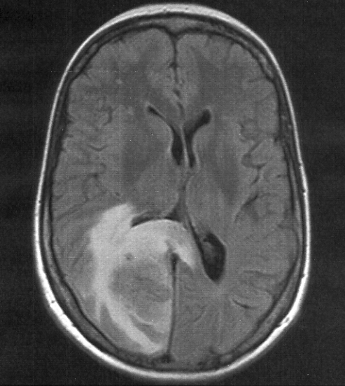 Schädel MRT (t2 flair) einer Hirnmetastase mit begleitendem Ödem. Siehe auch dazugehörige PET-Untersuchung: Image:HirnmetastasePET001.jpg.